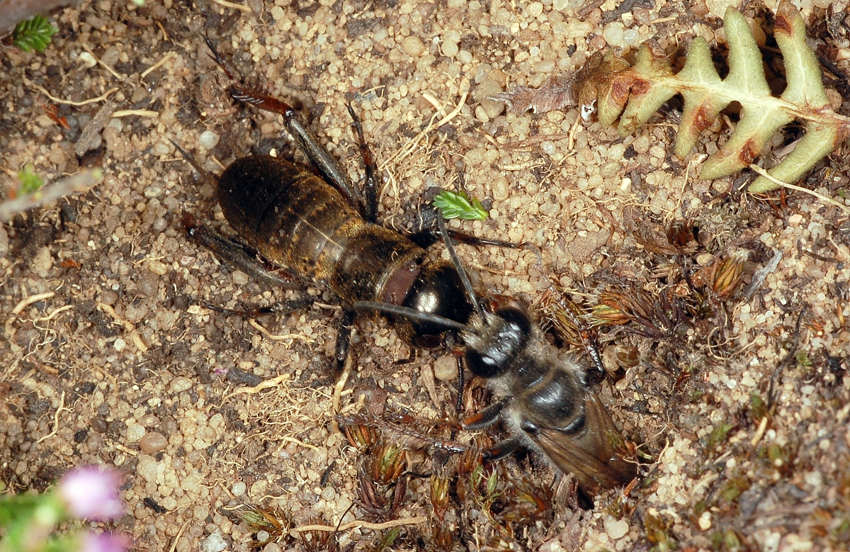 Sphex funerarius mit Gryllus campestris als Beute, Stromtrasse neben der Startbahn West, Kelsterbach, Hessen, Deutschland